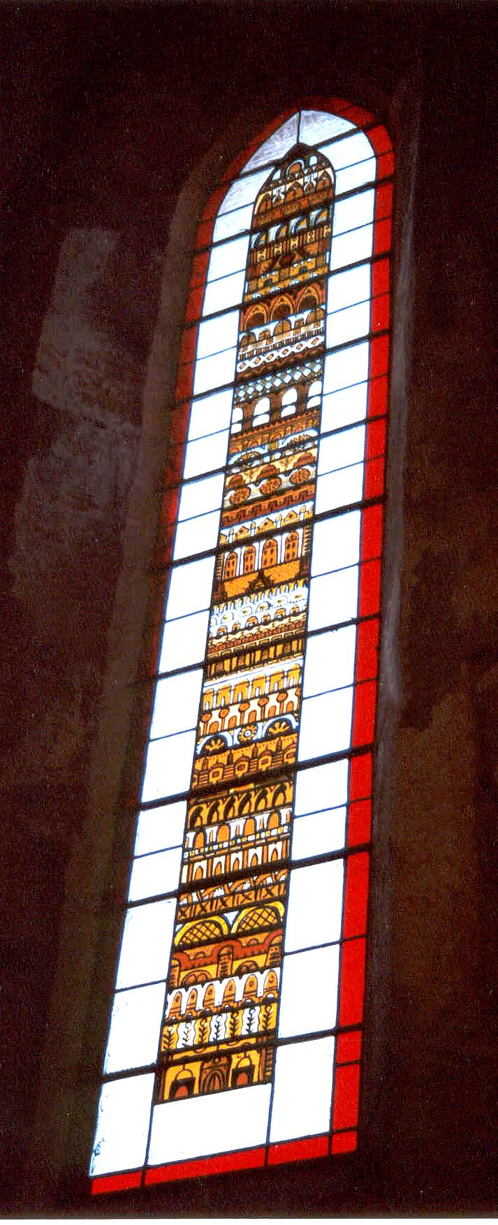 vitrail de Carlo Roccella